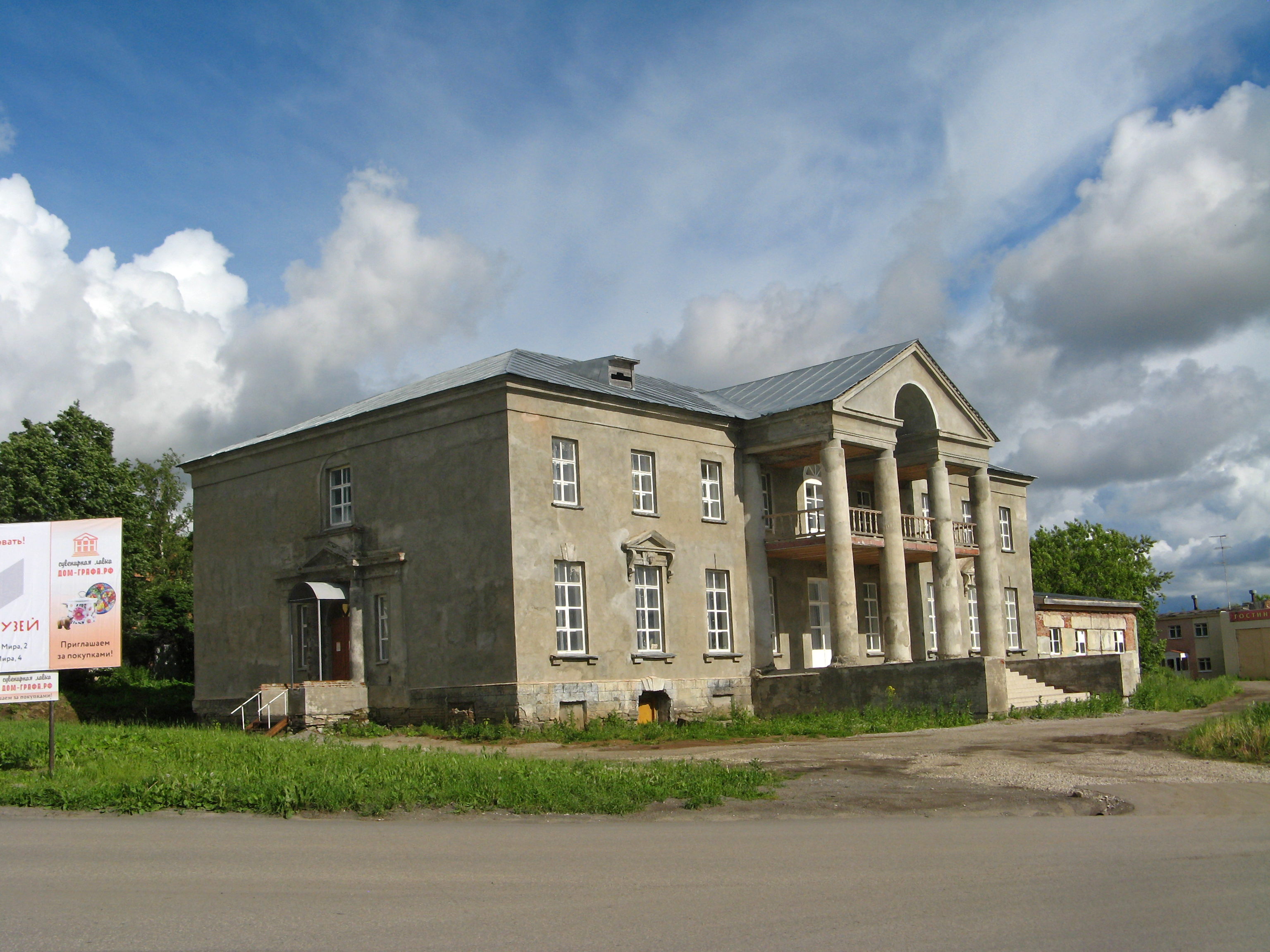 Дом владельца завода Шувалова: улица Мира, 2, Лысьва, Пермский край